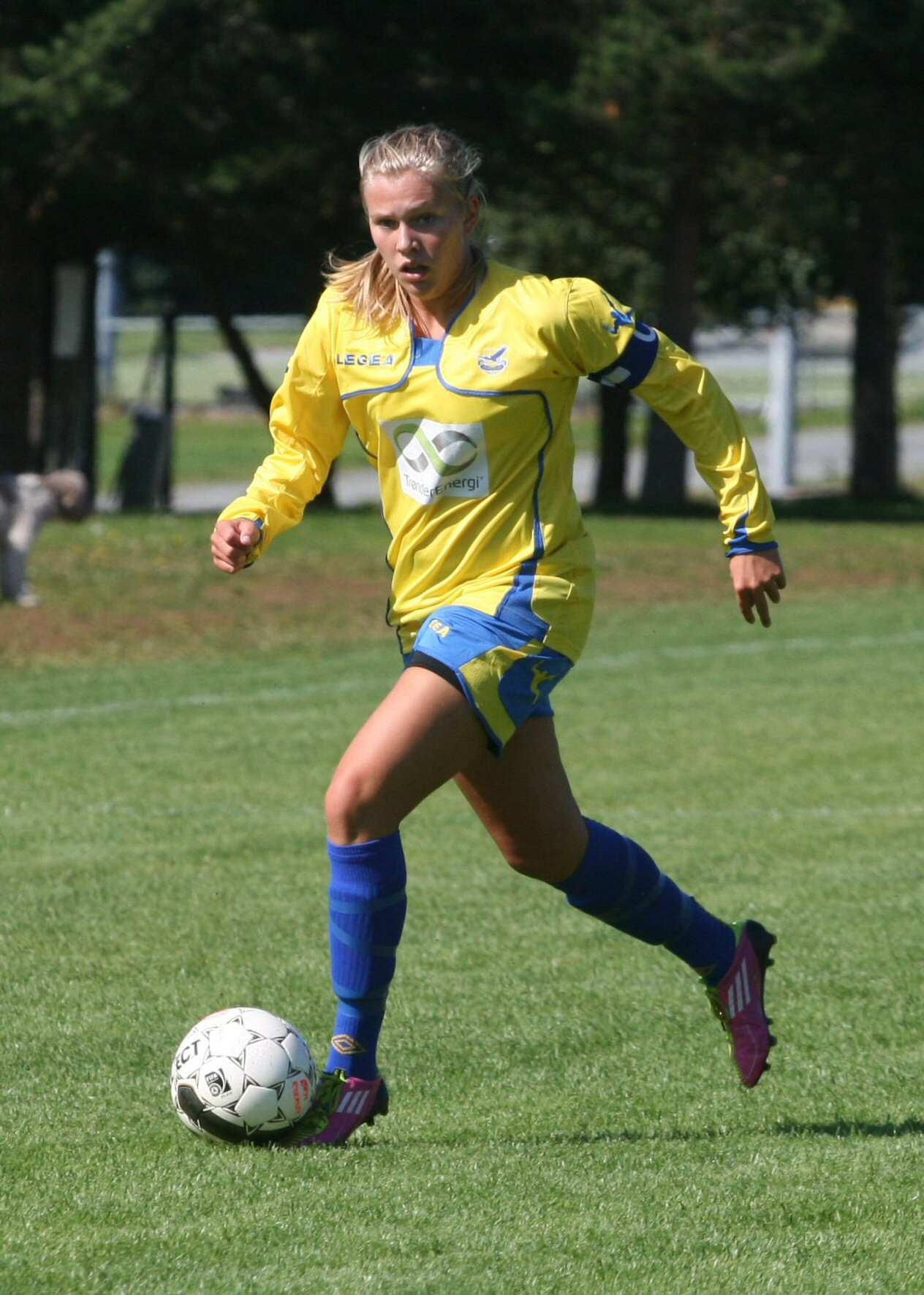 Fotballspilleren Guro Ramstad